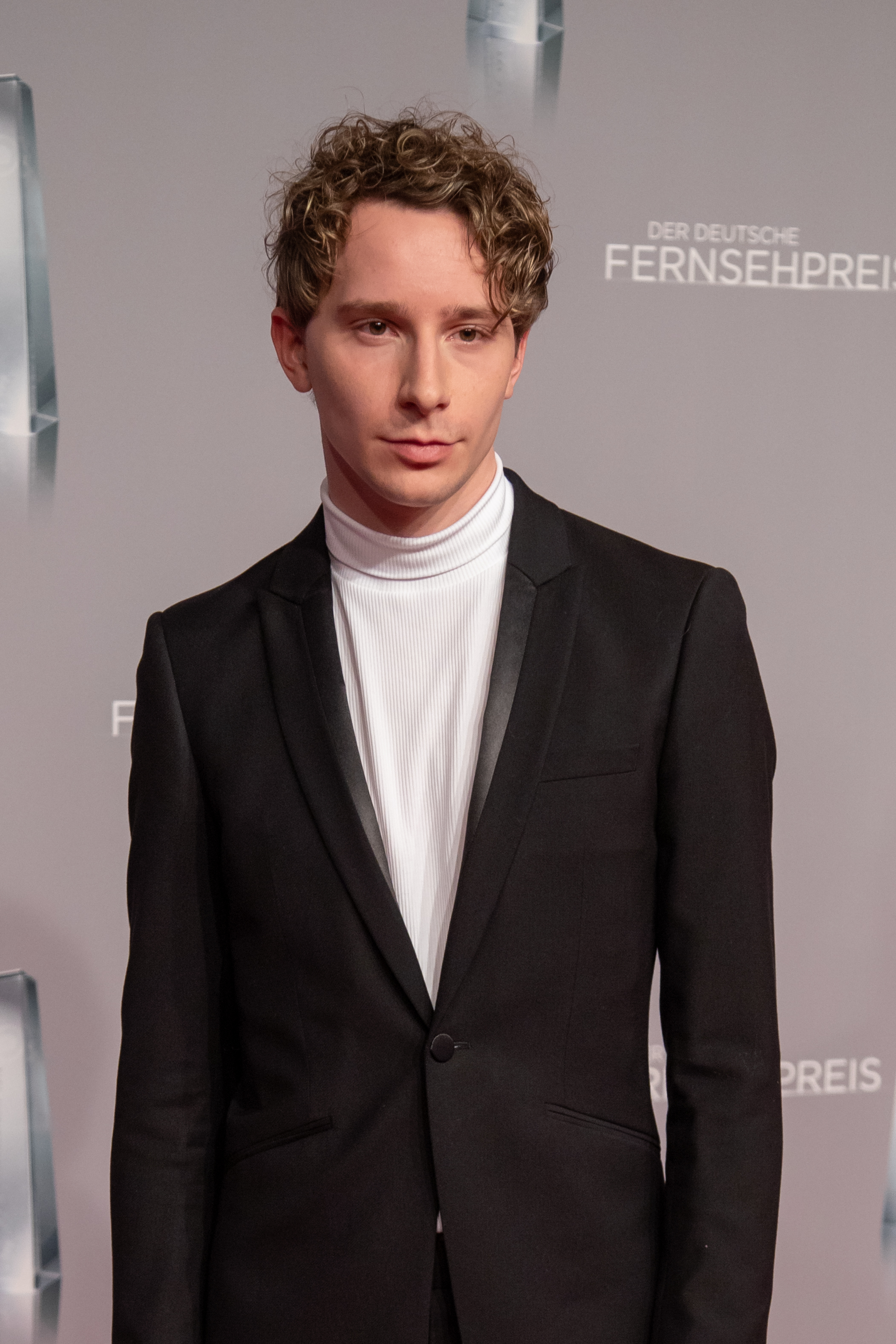 Jonathan Berlin beim Deutschen Fernsehpreis 2019 in der Düsseldorfer Rheinterrasse